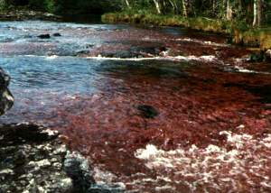 Algen des Flusses Caño Cristales GNU FDL Managementboy 17:24, 15. Jul 2004 (CEST)